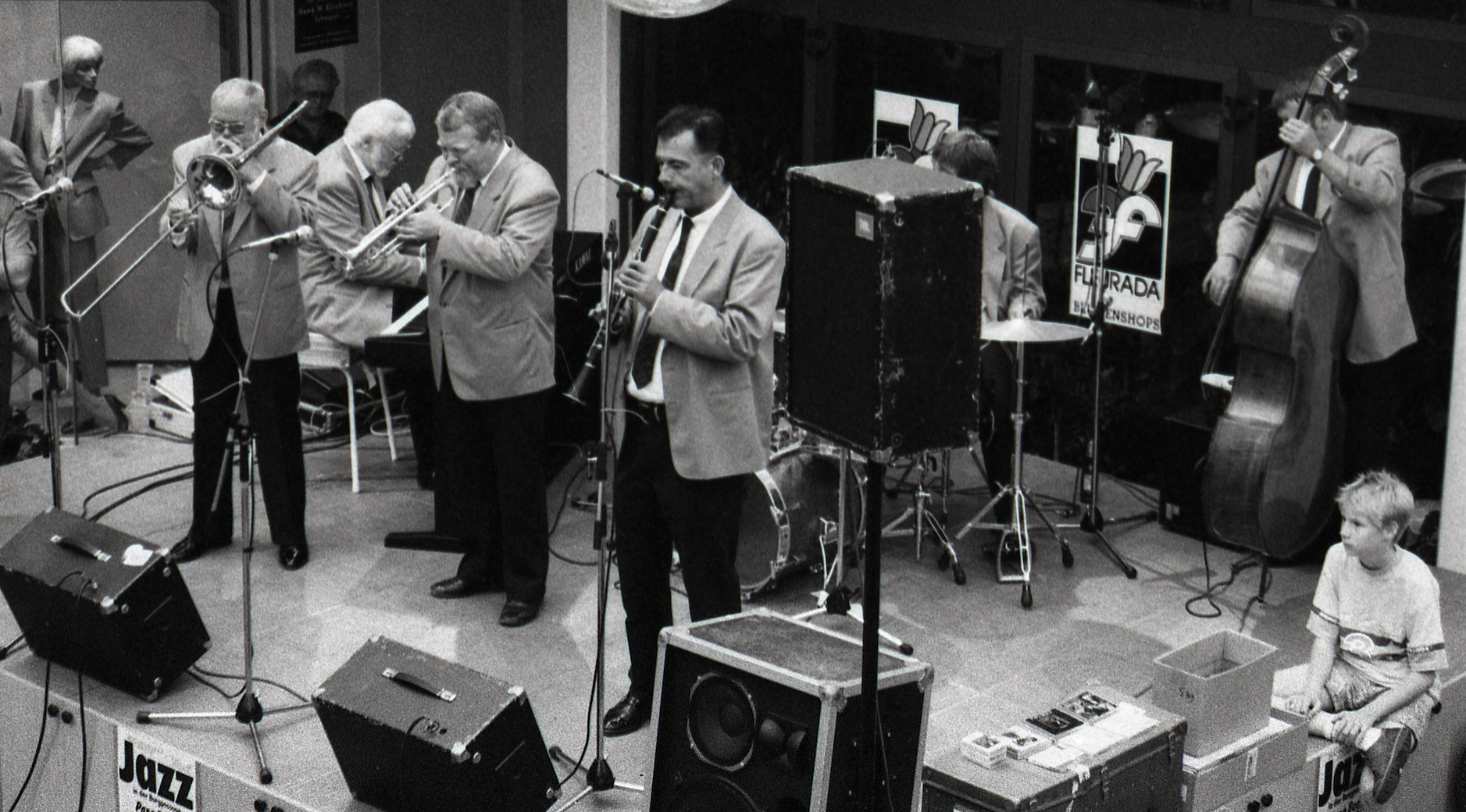 Papa Bues Viking Jazzband geben ein Konzert am 07.07.1992 in Braunschweig in der Burgpassage